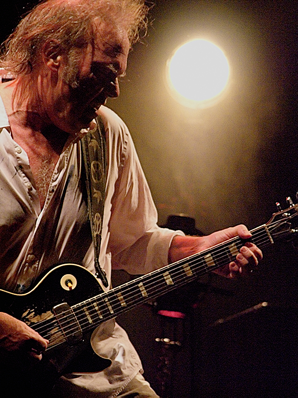 Neil Young, 22/06/2008 Firenze, Nelson Mandela Forum